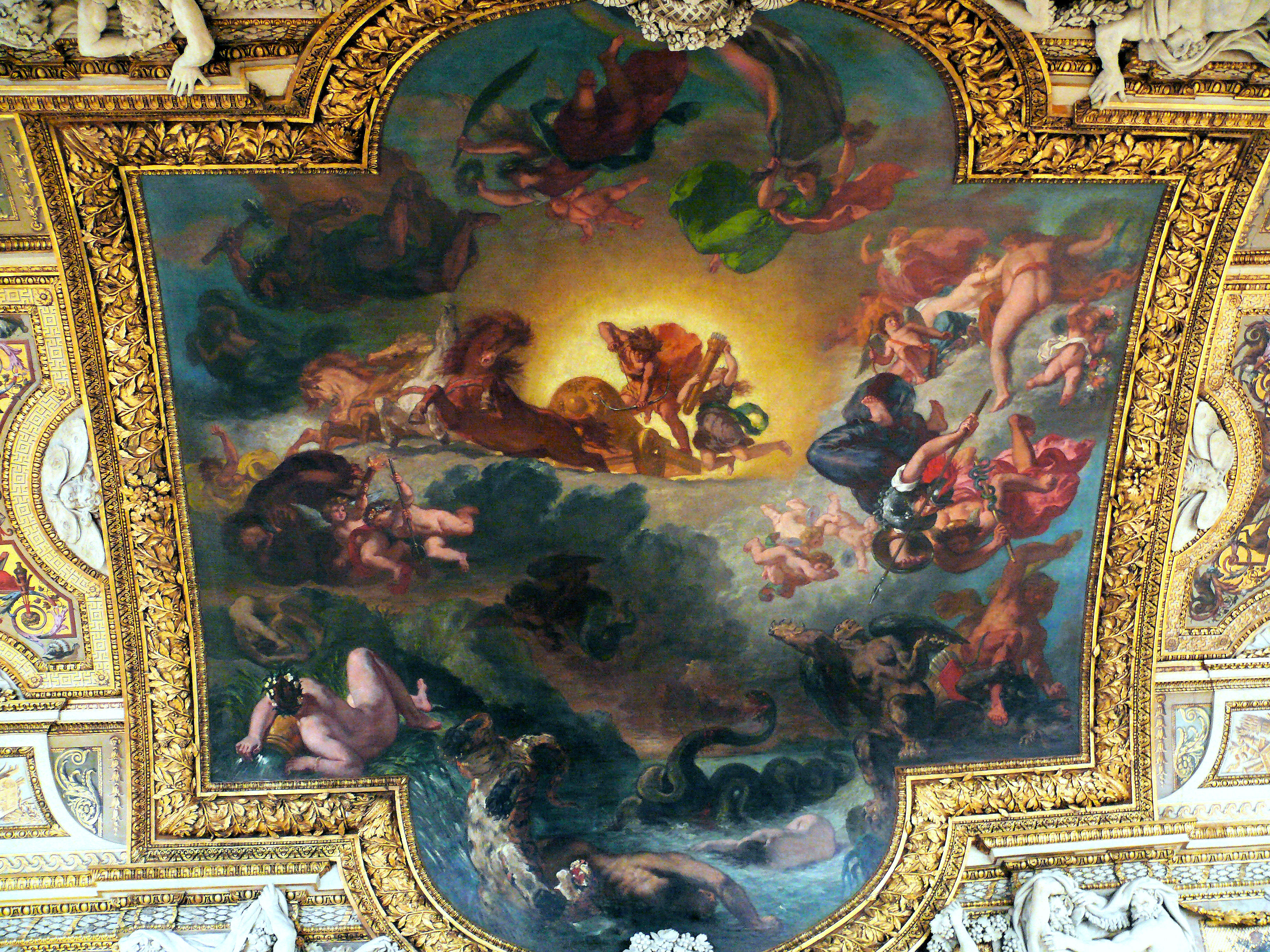 Palais du Louvre - Galerie d'Apollon - Eugène Delacroix : Apollon terrassant le serpent Python